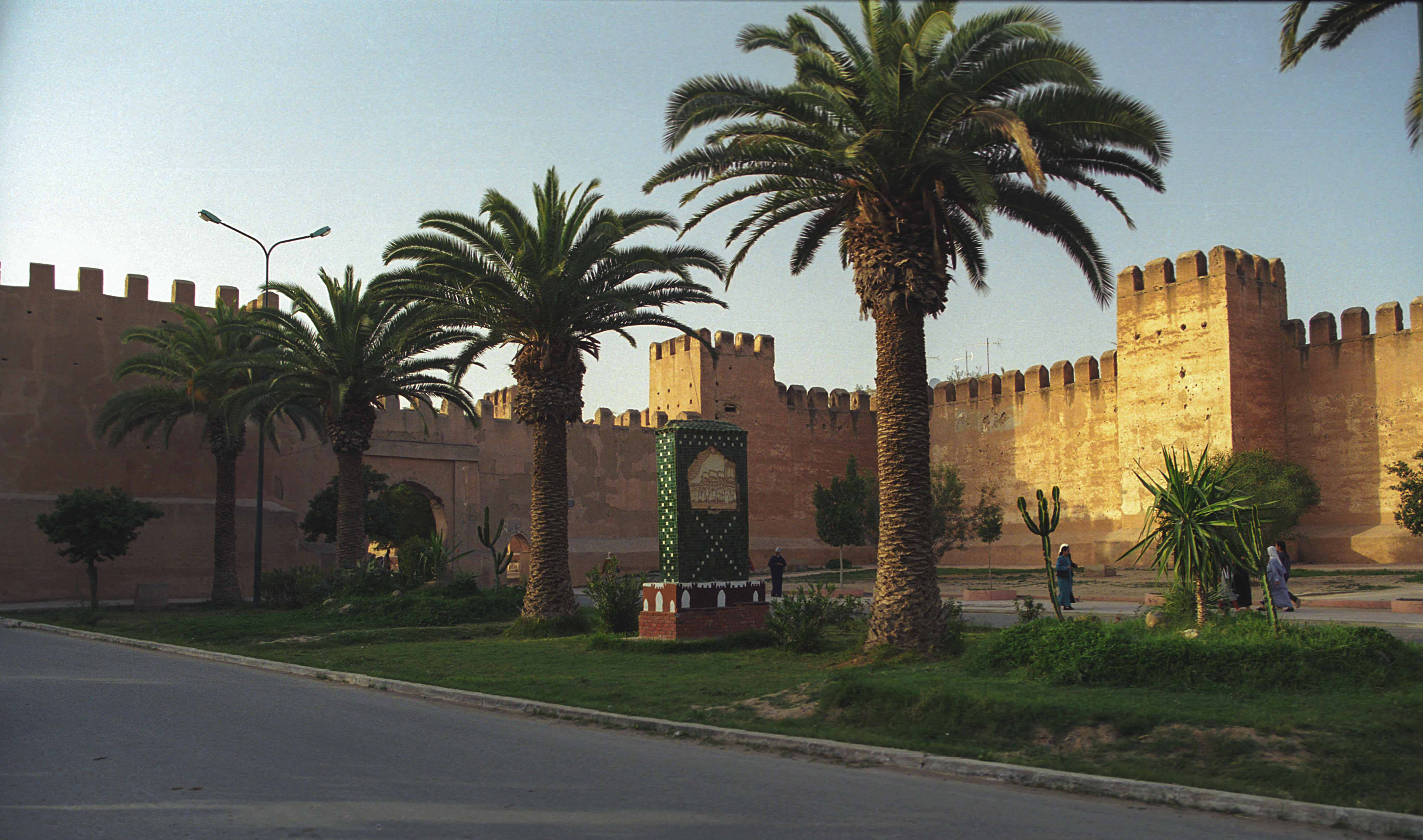 Mury Tarudantu